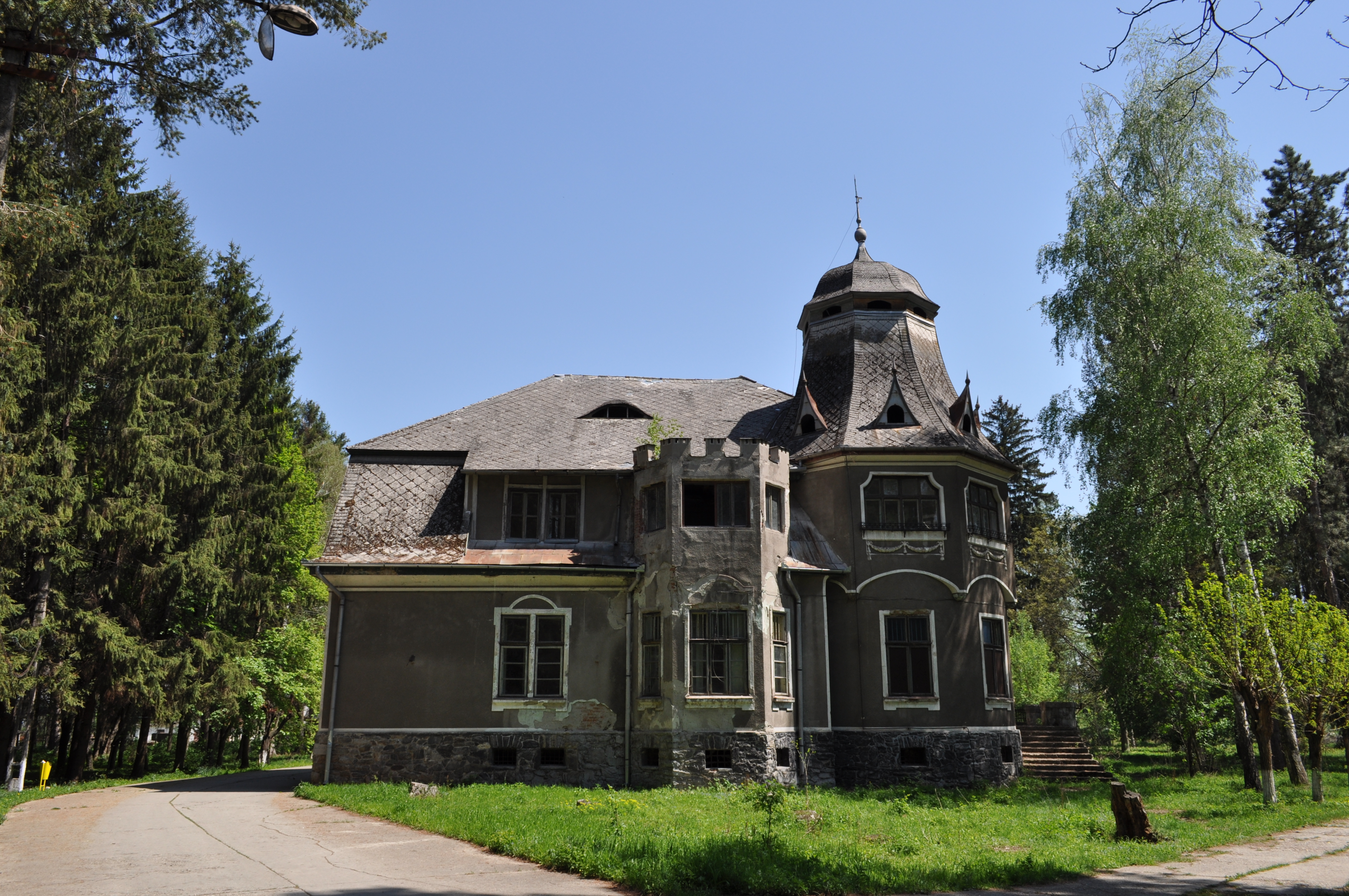 Castelul Pogany din satul PĂCLIŞA; comuna TOTEŞTI 01